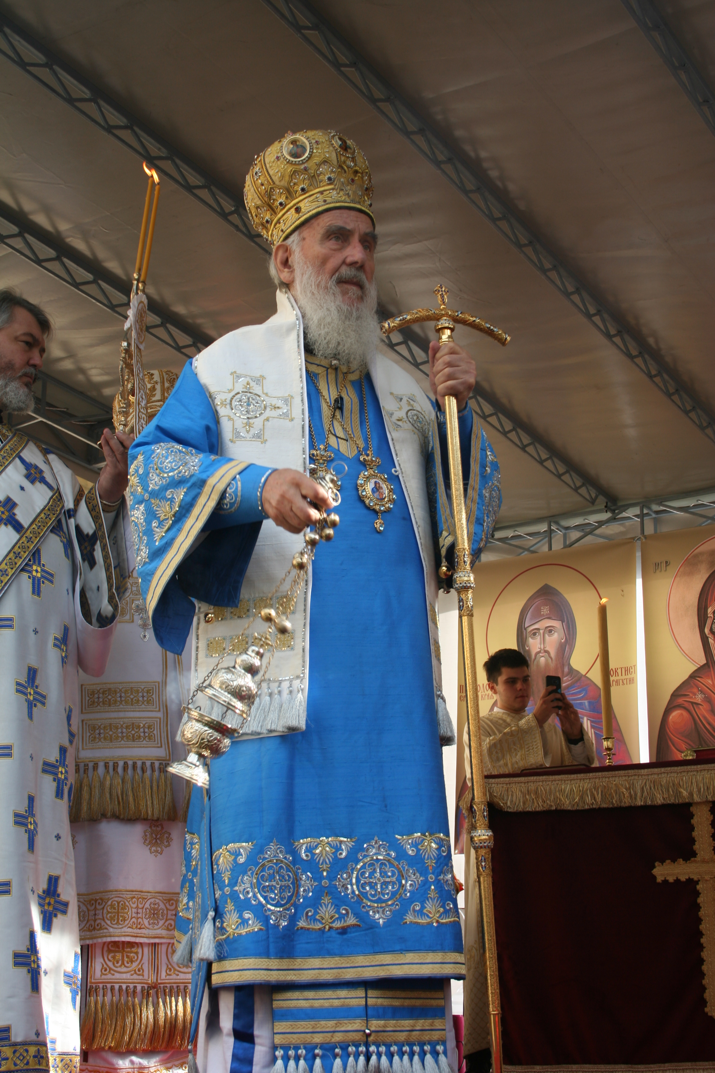 Manastir Tronoša-proslava 700 godina postojanja